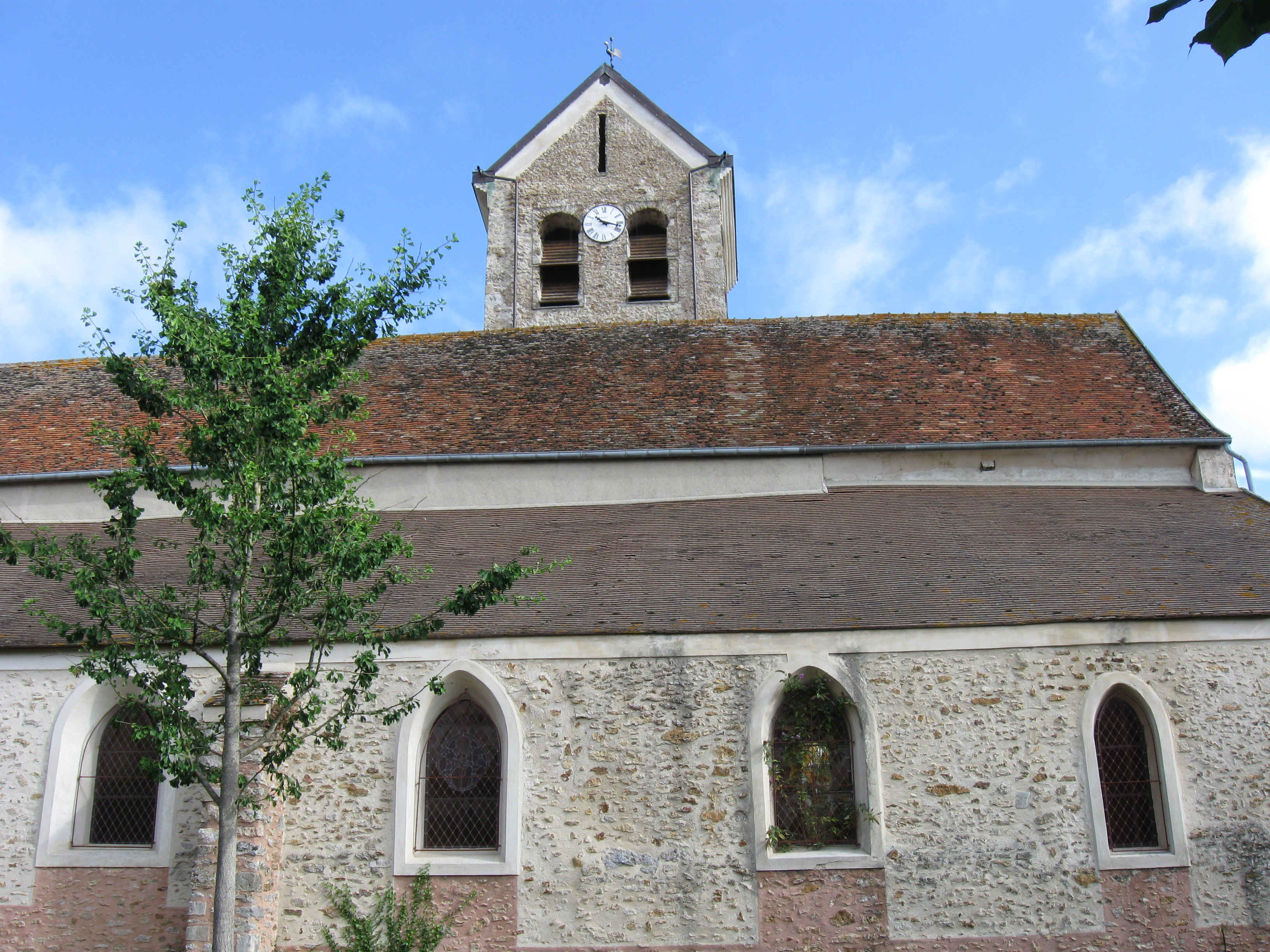 Église catholique Saint-Martin de Favières. (Seine-et-Marne, région Île-de-France).